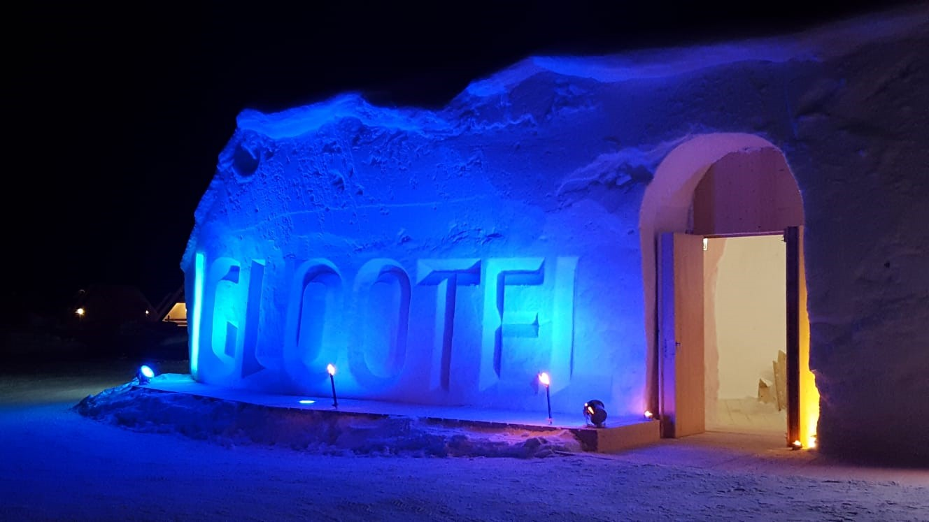 Außenansicht IGLOOTEL 2018